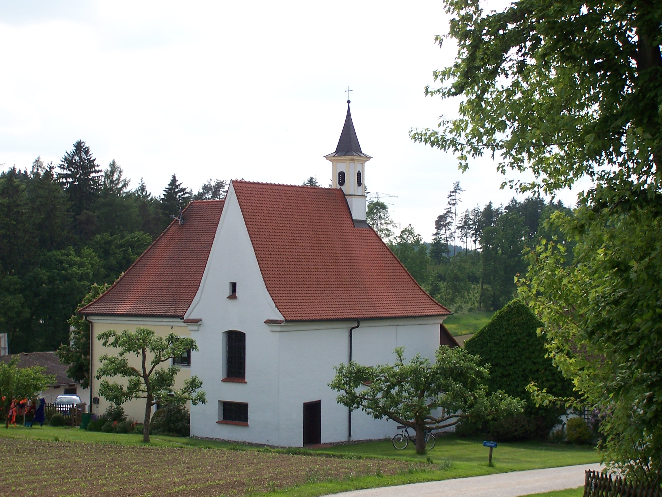 Rohr, Lorettostraße. Lorettokapelle Unserer Lieben Frau, 2. Hälfte 17. Jahrhundert; mit Ausstattung; anstoßende Klause, erbaut 1735.